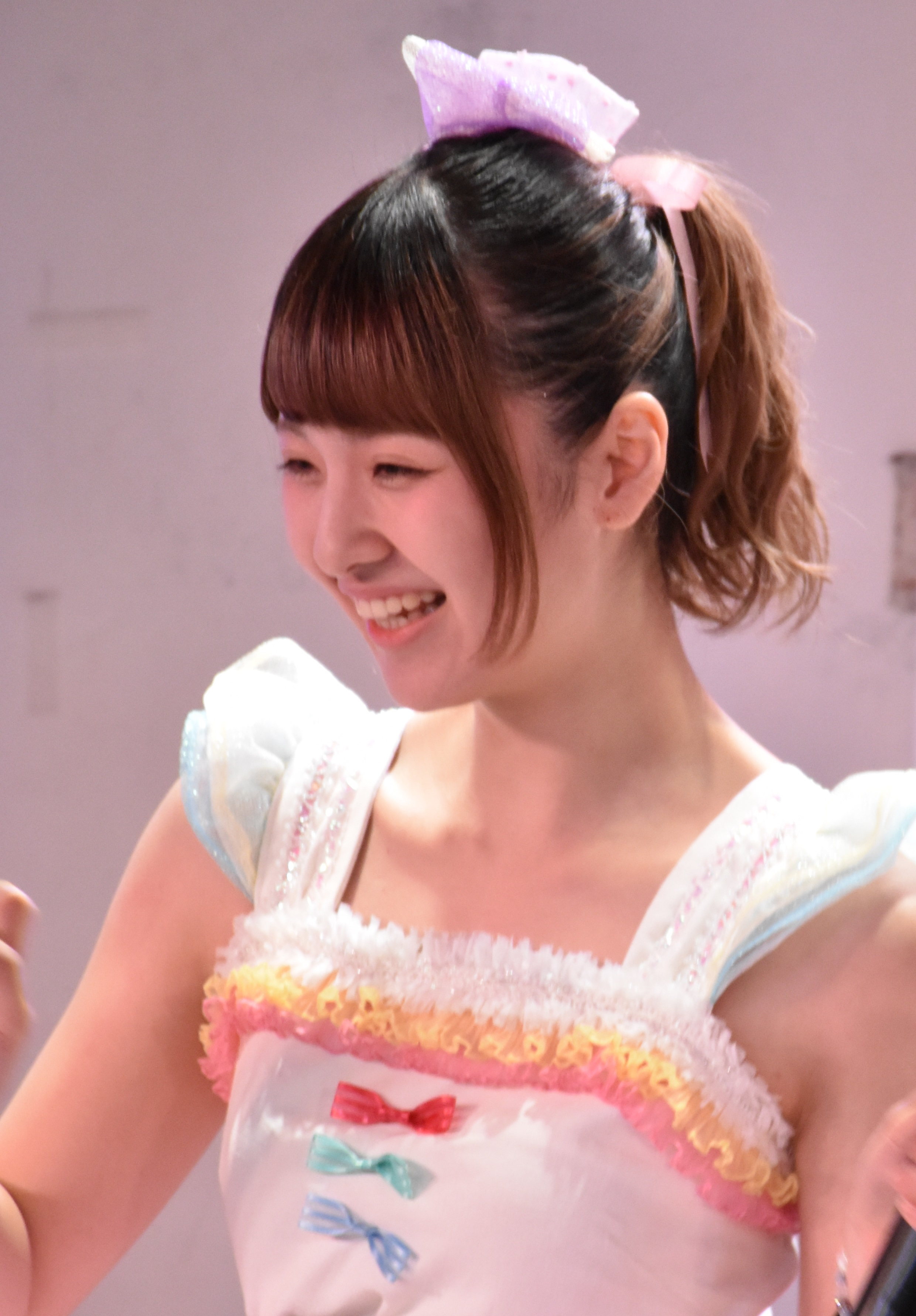 7月7日、JOL原宿でのお披露目ライブにて撮影。